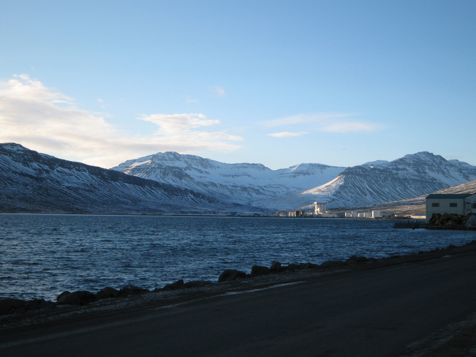 Neskaupstadur, Islandia 2007